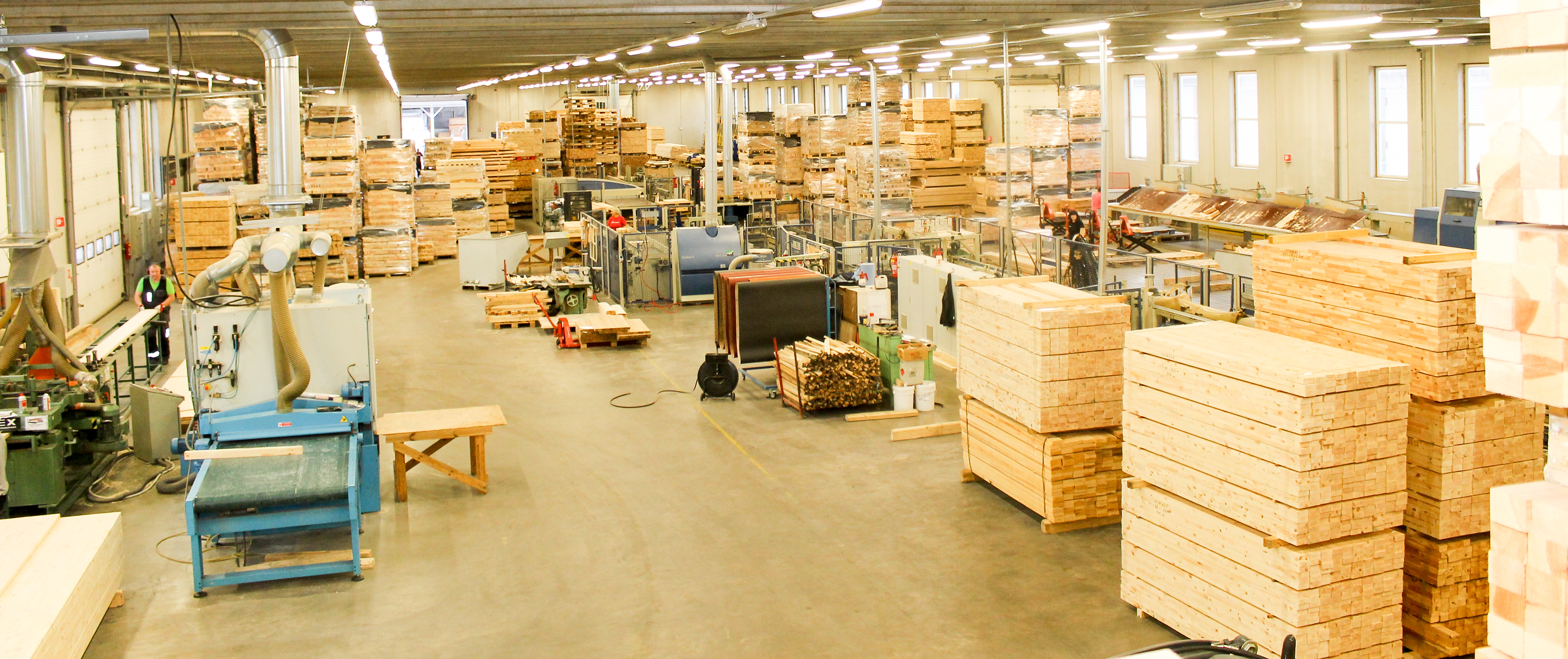 Aru Grupp